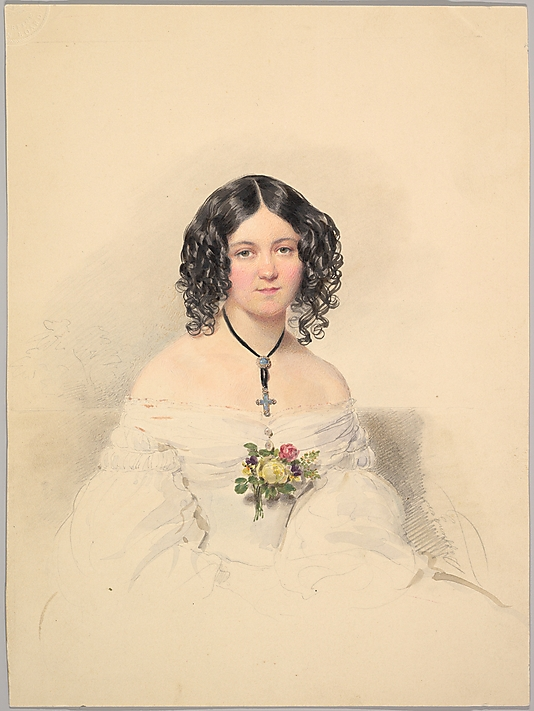 Comtesse Hélène Esterhàzy, née Comtesse Bézobrazofflabel QS:Lru,"Елена Николаевна Эстергази (1800/1801-1891), ур. Безобразова, в 1 браке была замужем за графом Александром Петровичем Апраксиным (1784/1793-1845); во 2 браке с 1841 года за графом Иосифом Эстергази (1791-1847)." label QS:Len,"Comtesse Hélène Esterhàzy, née Comtesse Bézobrazoff"